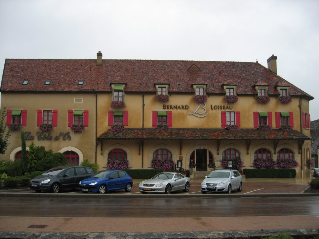 Restaurant la Cote d'Or de Saulieu - Bernard Loiseau